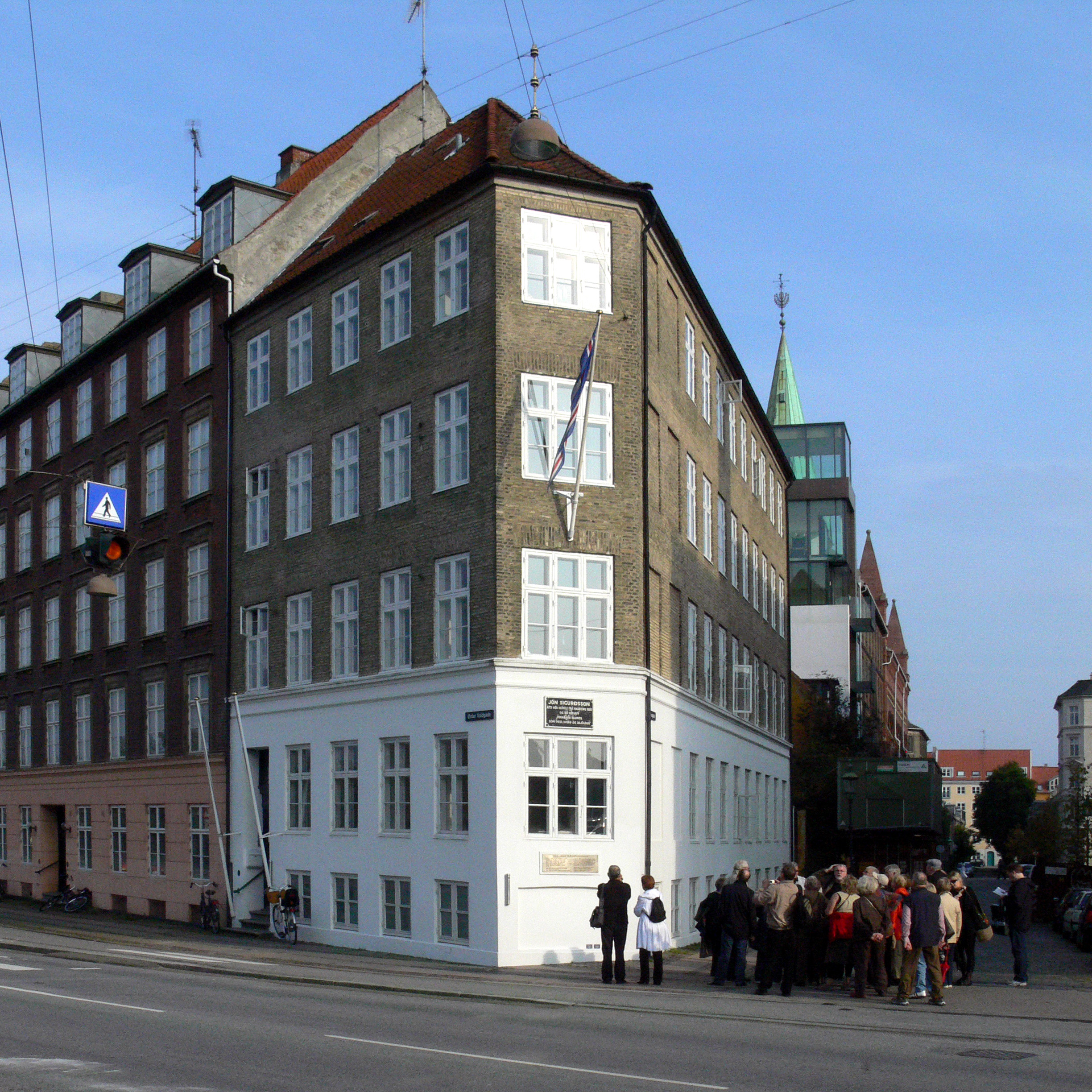 Das Haus, in dem Jón Sigurðsson von 1852–1879 lebte. Hier starb er auch.